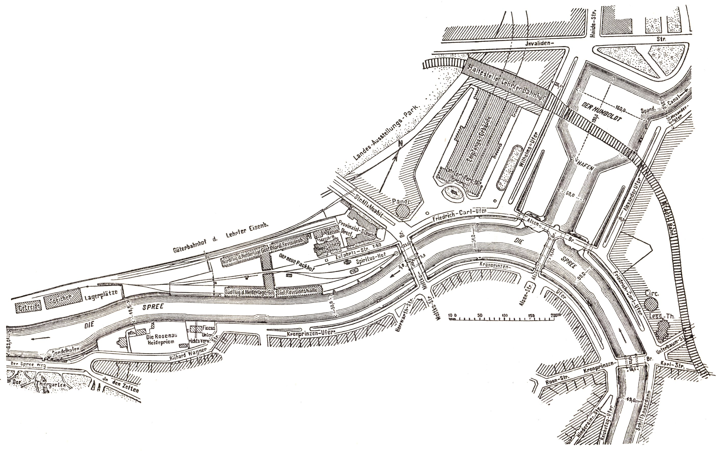 Berlin - Humboldthafen und Neuer Packhof, Lageplan 1896